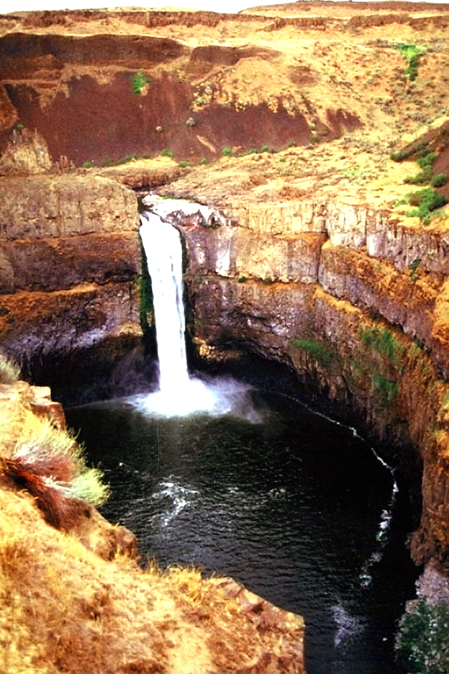 "Исполиновы котлы" (сухие водопады) на территории Channeled Scabland в Северной Америке. Фото Кинана Ли (Kenan Lee) Источник: Рудой А.Н. Гигантская рябь течения. Томск, 2005. Дата - 2003 год.